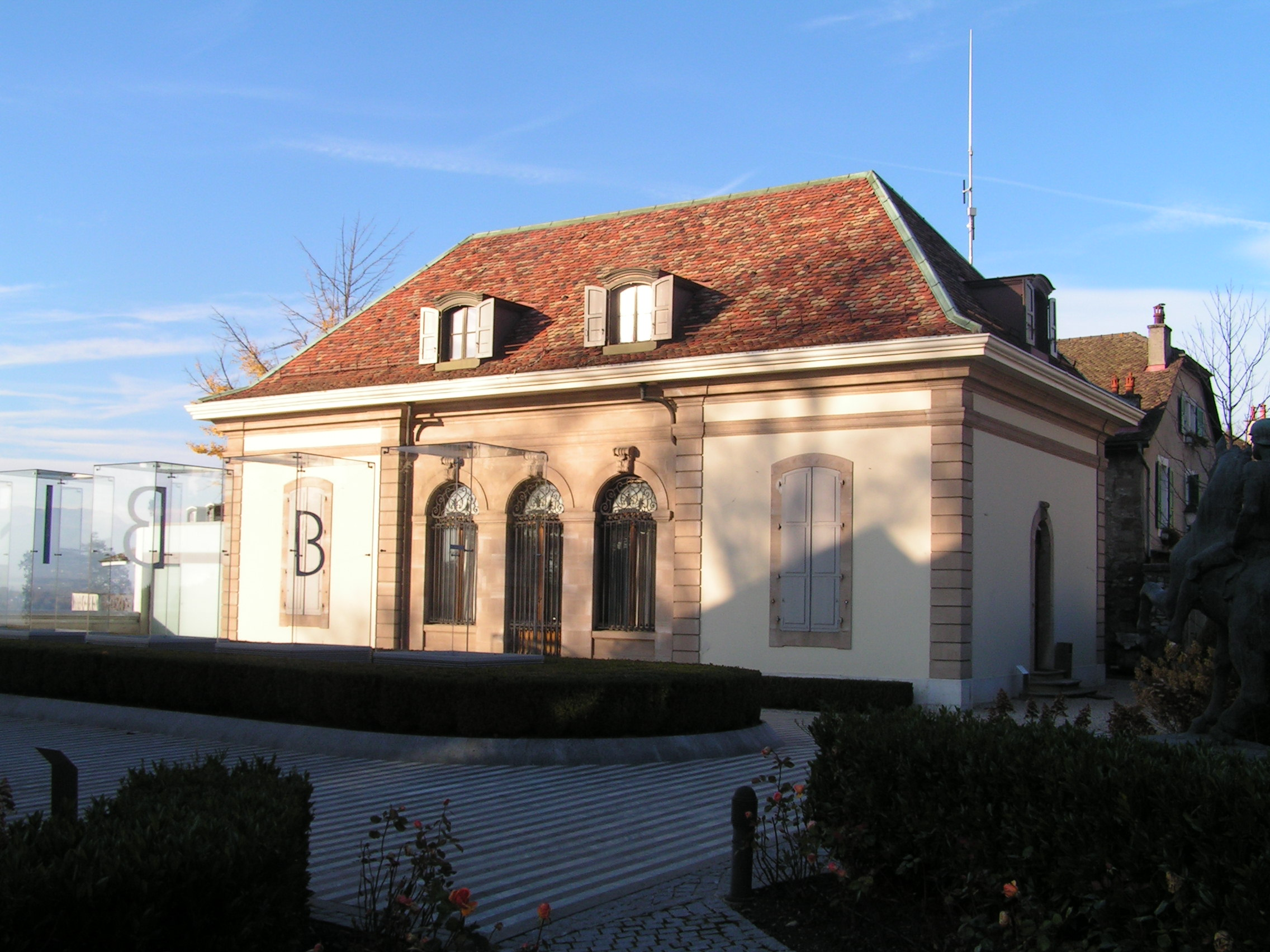 Fondation Martin Bodmer à Cologny, Genève